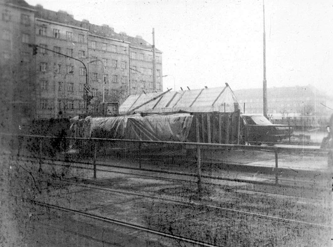 Praha, Žižkov, Vinohradská ulice, výstavba stanice metra Flora.